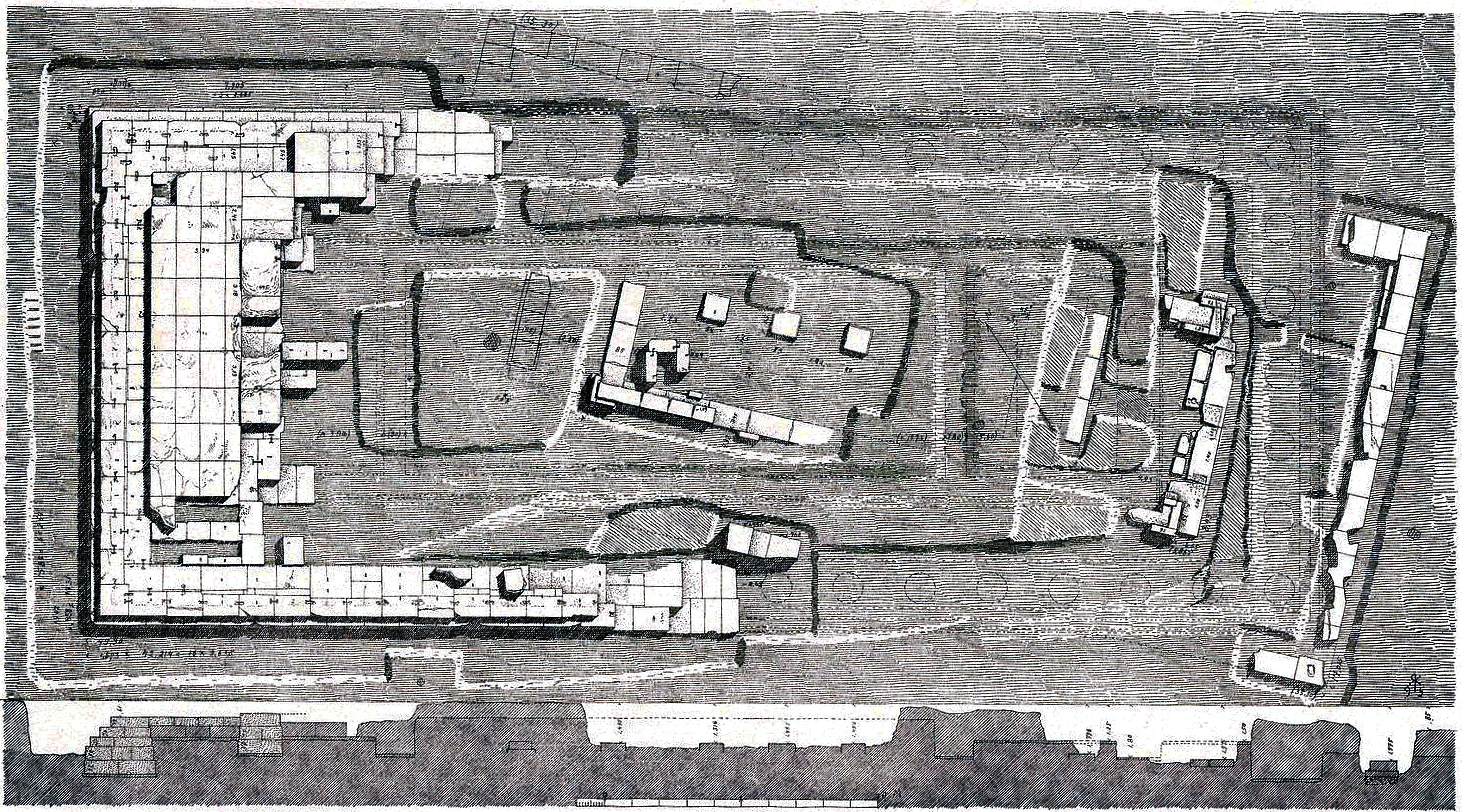 Der Ionische Tempel in Locri